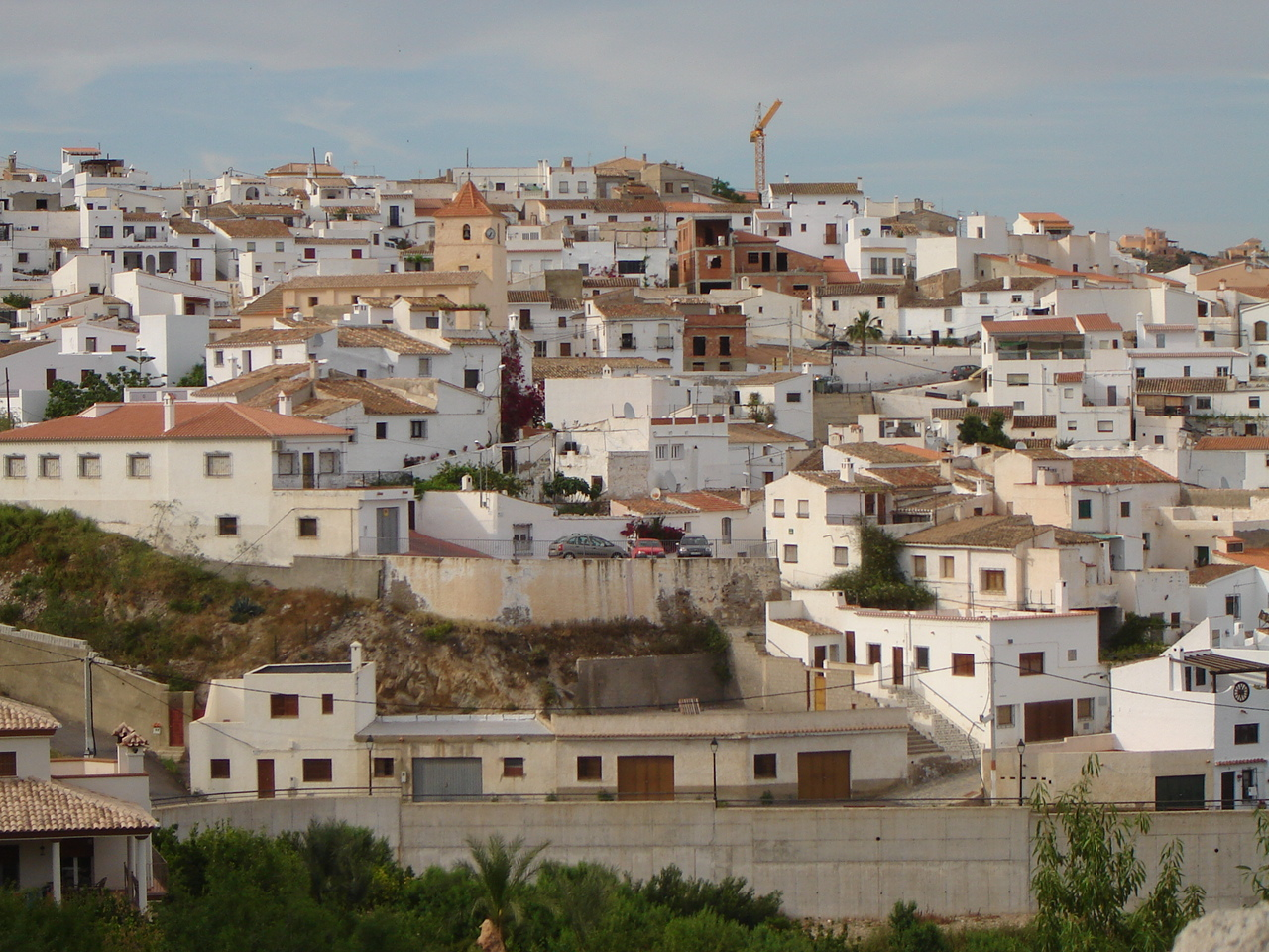 Vista del municipio español de Bédar, Almería, desde la Fuente Temprana Camino Serena.